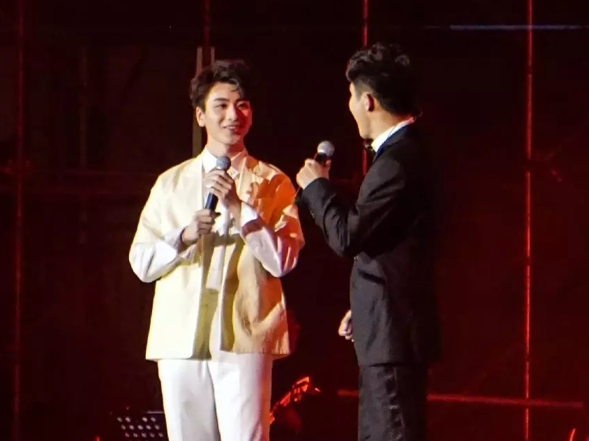 中文（中国大陆）: 蔡程昱、马佳 于“成都音乐盛典保利art音乐节”